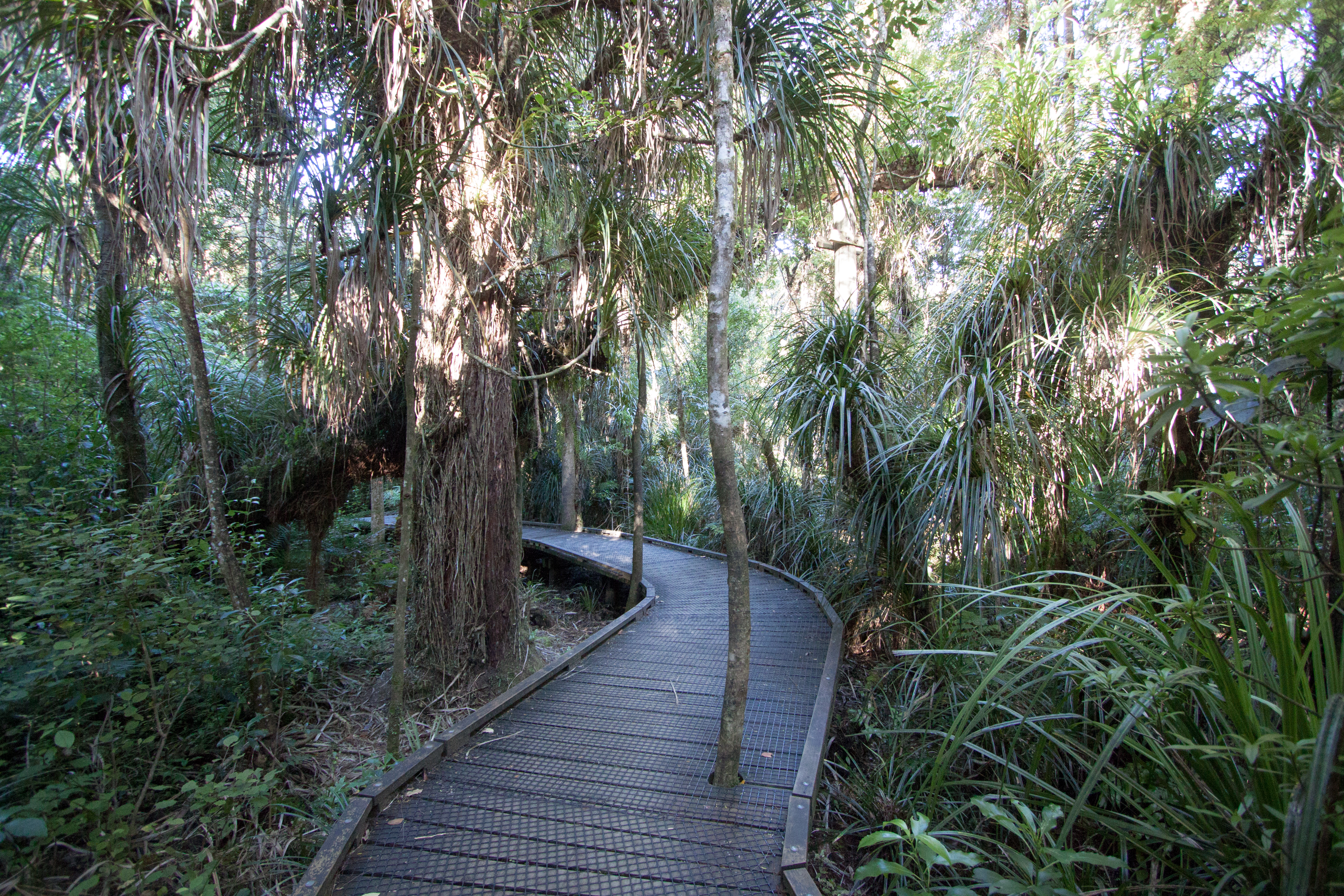 Waipoua Forest, visitors' trail